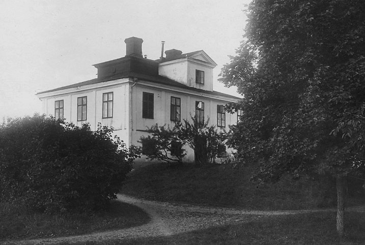 Stora Ängby huvudbyggnad innan renoveringen